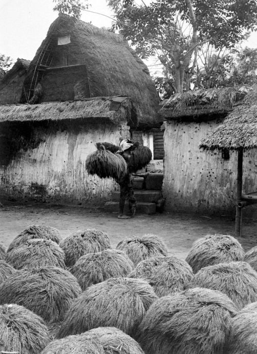 Repronegatief. Bali is door velen als een Java in het klein beschouwd. Doordat de twee aan elkaar grenzende eilanden zoveel gemeen hebben, is het niet zo vreemd om Bali als een soort verlengstuk van Java te zien. Zo beschouwde de Amerikaanse antropoloog Clifford Geertz, in zijn bekende Agricultural Involution, Java en Bali (en een stukje Lombok) als 'Inner Indonesia', tegenover de rest van de Archipel ('Outer Indonesia'). In die visie speelden de hoge bevolkingsdichtheid en de 'natte' rijstbouw (rijst op geïrrigeerde of van de regen afhankelijke sawahs), die de eilanden kenmerken, een belangrijke rol. Er waren natuurlijk ook verschillen, zoals de subak, de irrigatievereniging, die wel op Bali en niet op Java voorkwam. (P. Boomgaard, 2001). Opschuring van rijst, Bali